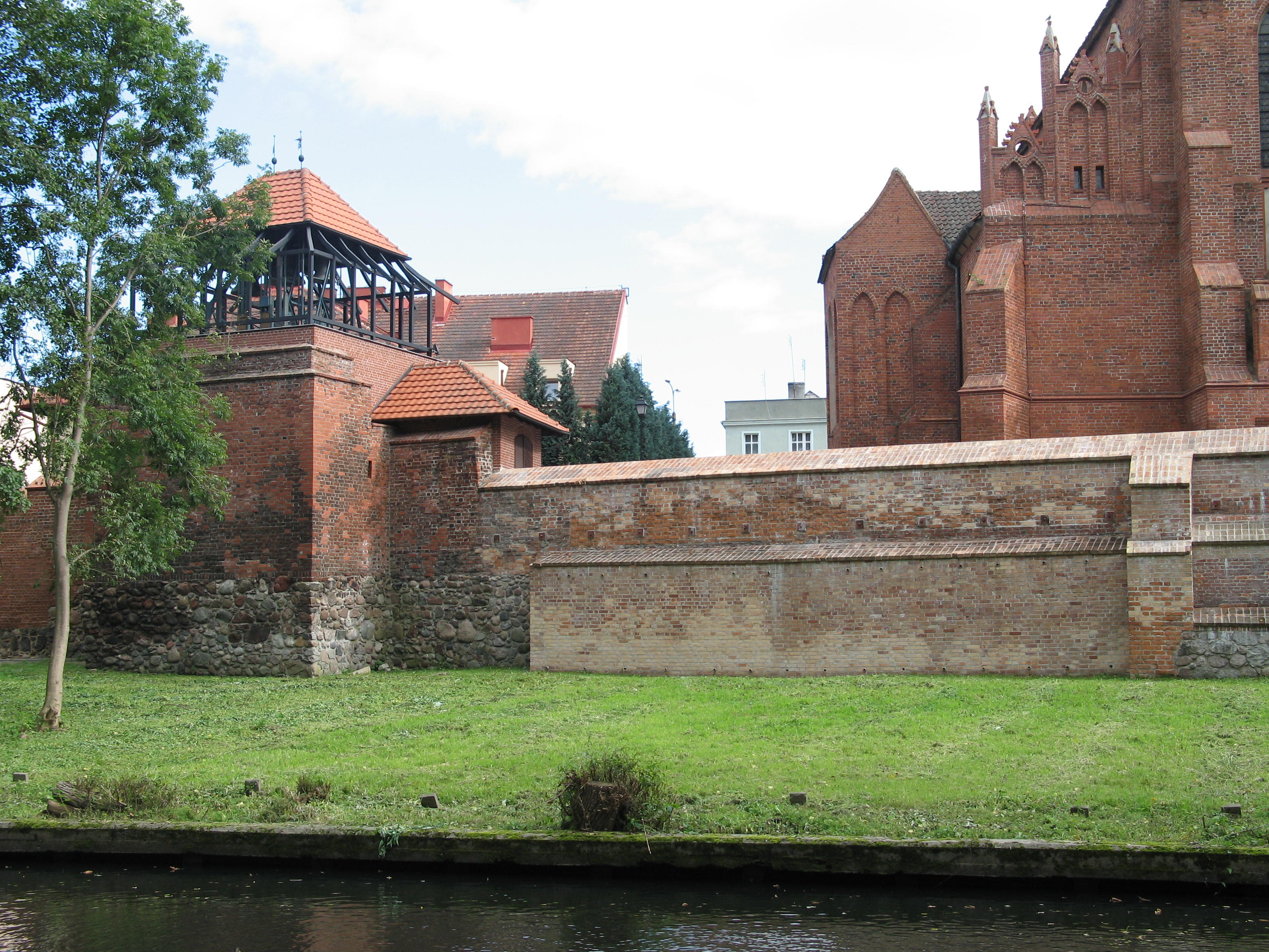 Fragment średniowiecznych murów obronnych w Starogardzie Gdańskim. Widok od strony rzeki Wierzycy. Po prawej lewa nawa fary p.w św. Mateusza.